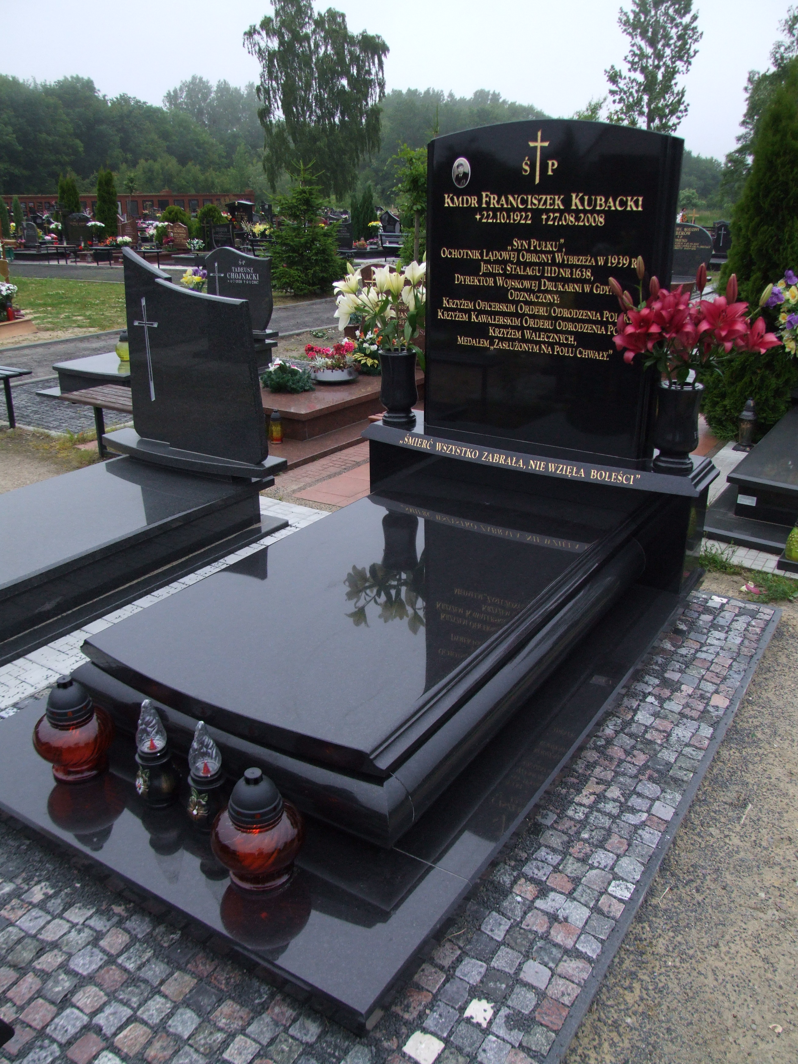 Gdynia-Oksywie Cmentarz Marynarki Wojennej